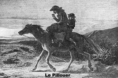 Gravure représentant un pilhaouer au XIXème siècle